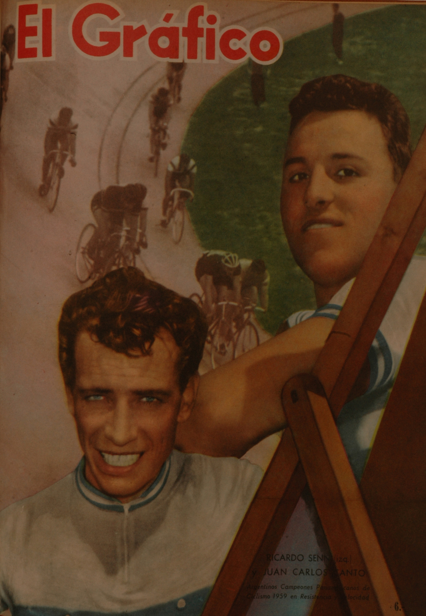 El Grafico del 28 de Octubre de 1959. Edicion 2092